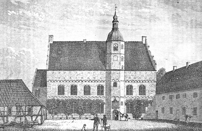 Ørbæklunde er dannet ca. år 1500 af Poul Laxmand og kaldt Lundsgaard. Gården ligger i Ørbæk Sogn, Vindinge Herred, Ørbæk Kommune. Hovedbygningen er opført i 1560-1593